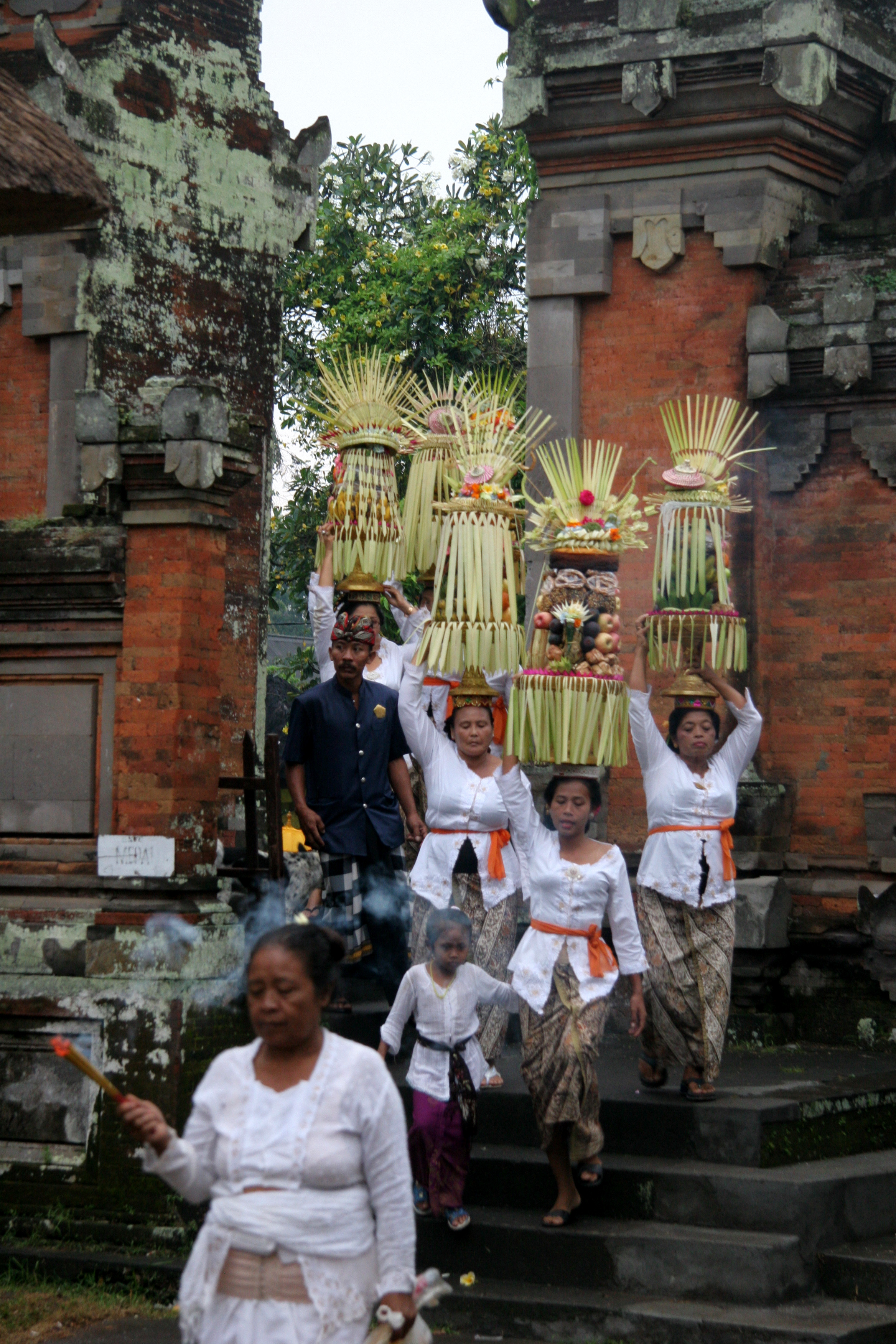 Bali Temple d'Ubud femmes venant faire leurs offrandes dans le temple